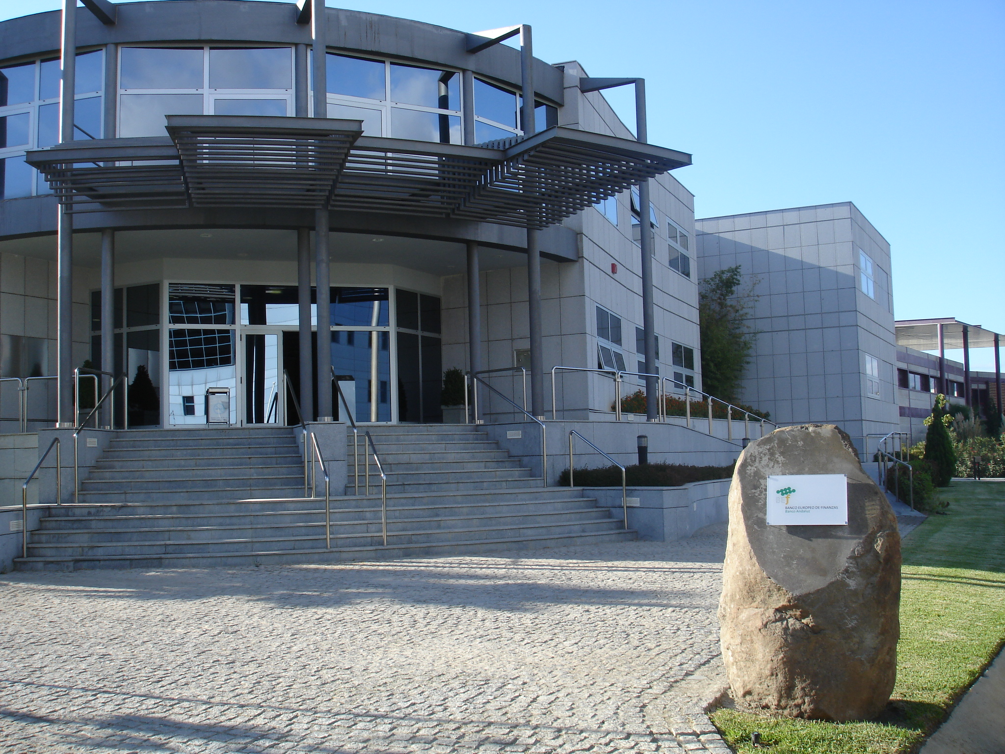 Entrada principal de la Sede social del Banco Europeo de Finanzas